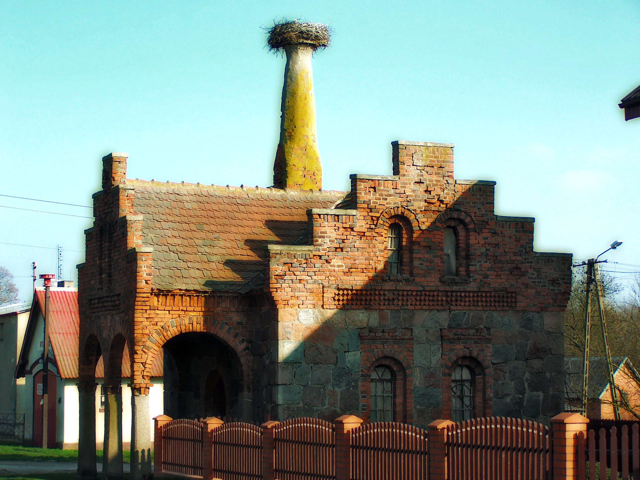 Wydartowo - kuźnia z 1856 r. (zabytek nr 82/Wlkp/A)